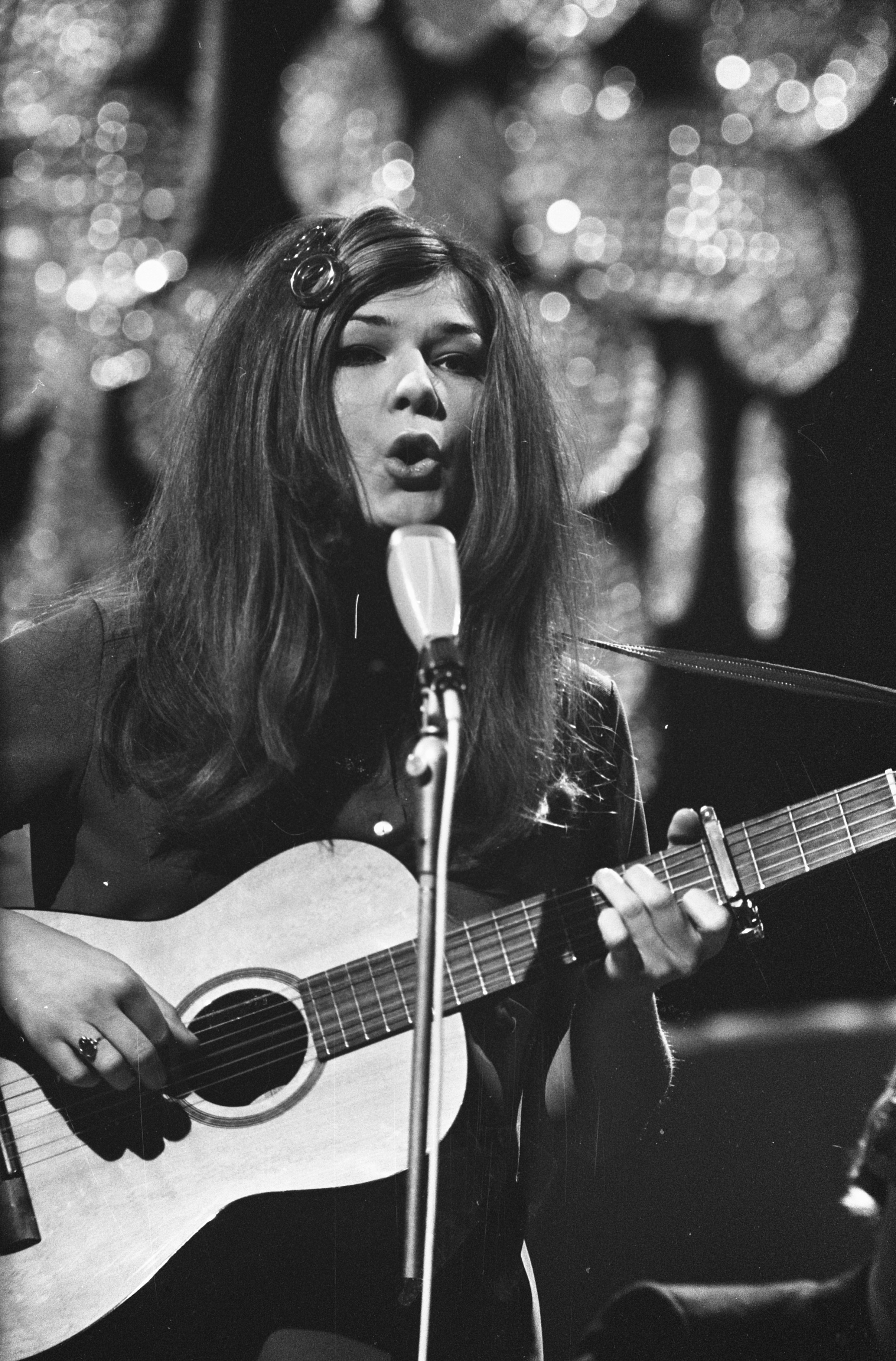 Collectie / Archief : Fotocollectie Anefo Reportage / Serie : Songfestival 1969 Beschrijving : Nationale finale van het Eurovisie Songfestival in Scheveningen Lenny Kuhr Datum : 26 februari 1969 Locatie : Scheveningen, Zuid-Holland Trefwoorden : SONGFESTIVALS, finales Persoonsnaam : Kuhr, Lenny Fotograaf : Fotograaf Onbekend / Anefo Auteursrechthebbende : Nationaal Archief Materiaalsoort : Negatief (zwart/wit) Nummer archiefinventaris : bekijk toegang 2.24.01.05 Bestanddeelnummer : 922-1420